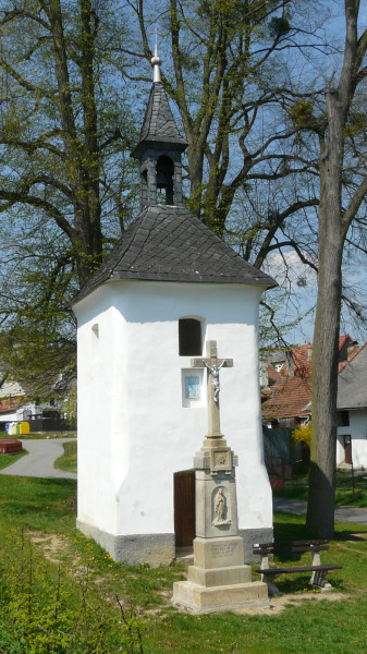 Zvonice s křížem na návsi v Polomí